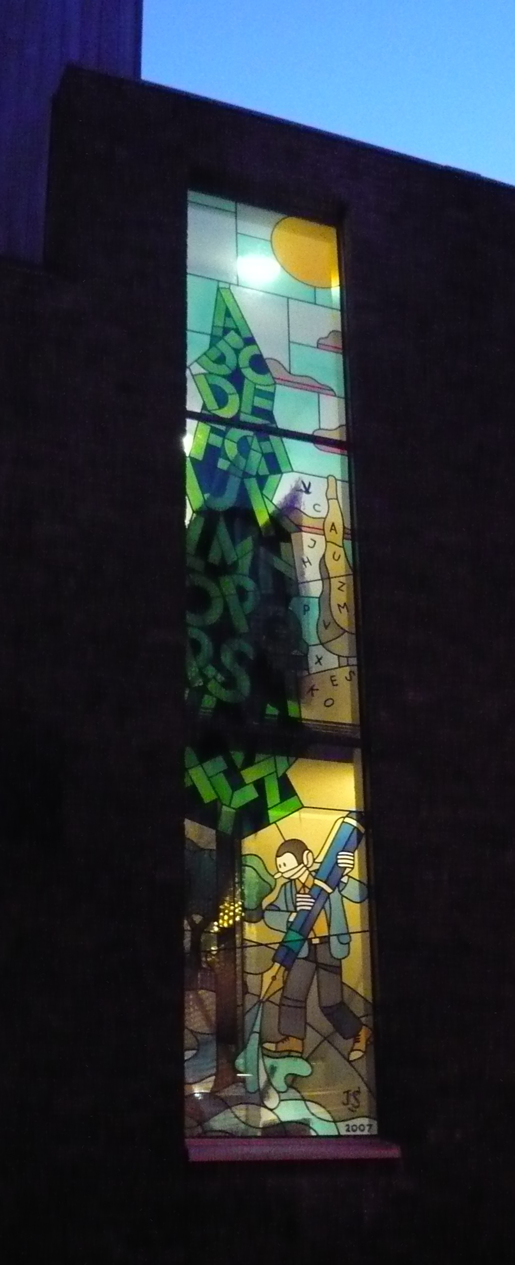 Johannes Enschede Hof, Korte Begijnestraat, Haarlem glas in lood raam door Joost Swarte in trappenhuis Johanens Enschede Hof- gemaakt om bekeken te worden vanaf het Korte Begijnestraat.